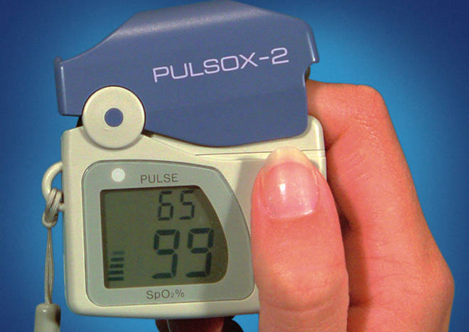 Anwendung eines Fingerpulsoximeters mit integriertem Clip